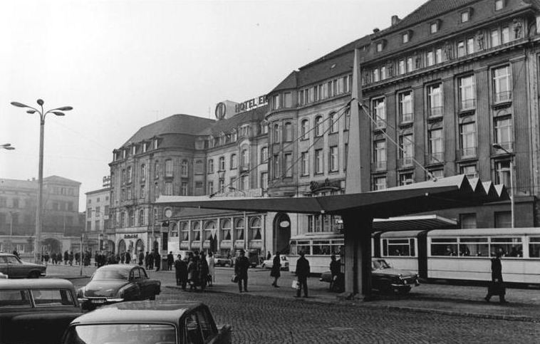 Erfurt, Hotel "Erfurter Hof" Zentralbild Demme 22.4.70 Erfurt: Interhotel "Erfurter Hof"